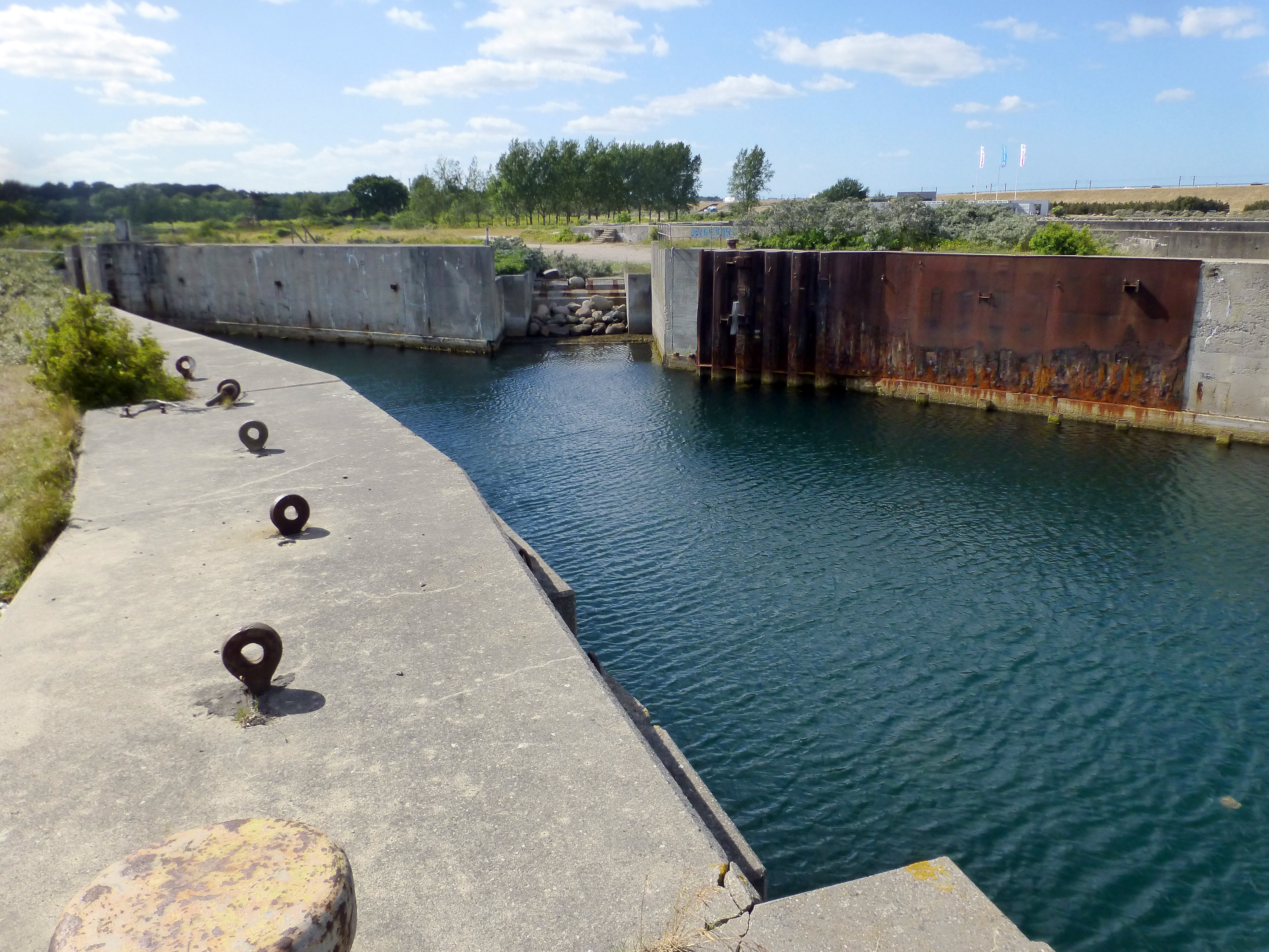 Knudshoved gl færgehavn